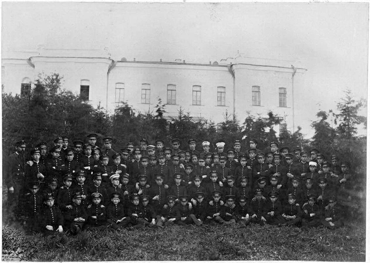 Группа учеников первых четырёх классов в саду тюменского Александровского реального училища